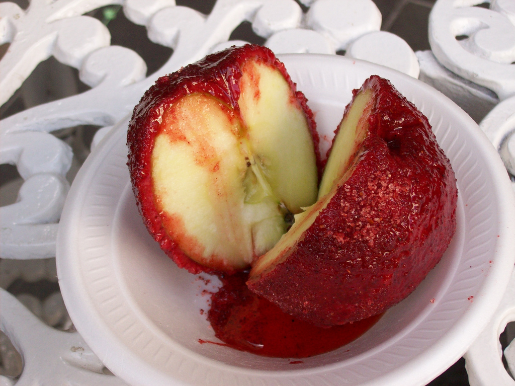 Manzana Cubierta de Chamoy (Apple covered in Chamoy)